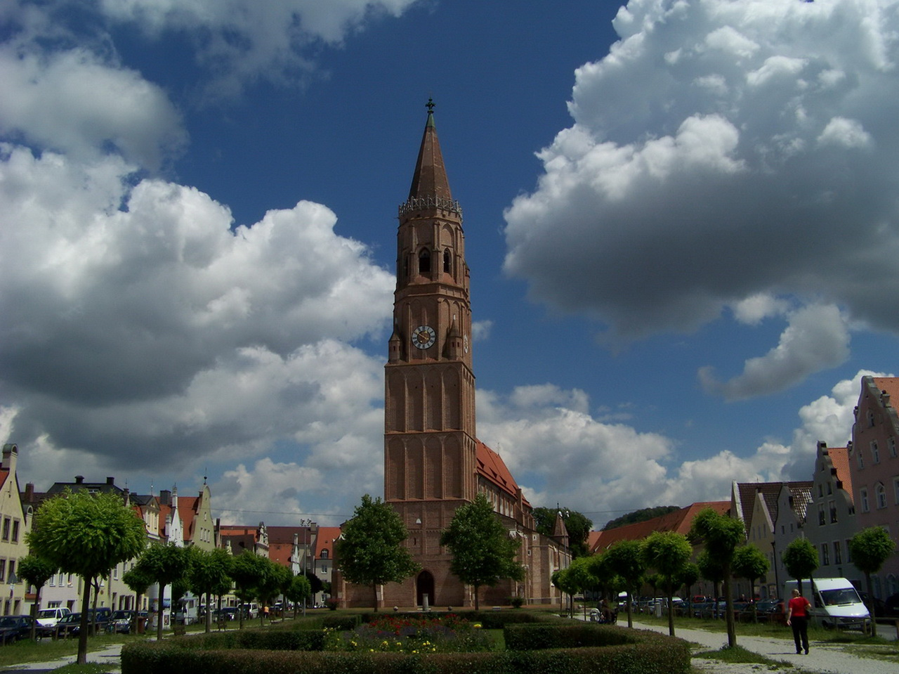 Kirche Sankt Jodok in der Freyung in Landshut. Der Bau steht mit der Stadterweiterung durch Herzog Heinrich im Jahre 1338 in unmittelbarem Zusammenhang. Die Kirche ist eine basilikale Anlage mit einschiffigem Chor, Kapellen am Langhaus und Westturm, den zwei Kapellen flankieren.